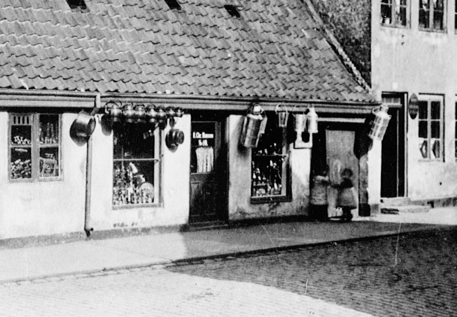 Klostergade 10, hvor kobbersmed Jens Hjernøe og siden kobbersmed H.Chr. Hansen havde til huse.